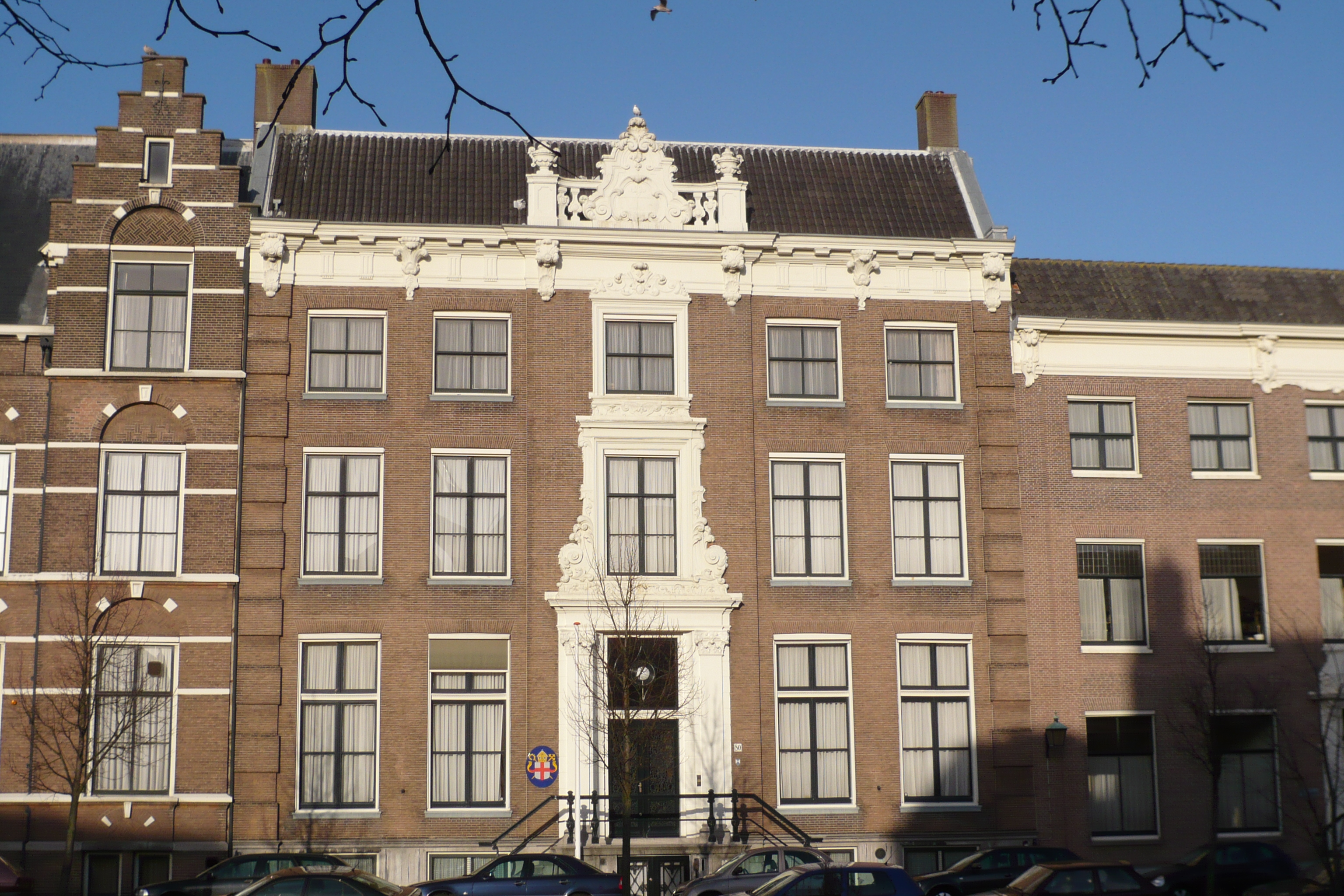 Bisschoppelijk Paleis, Nieuwe Gracht 80, Haarlem.